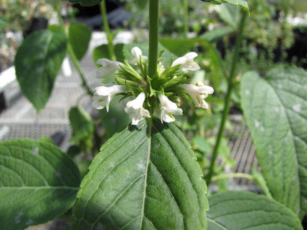 Phyllostegia haliakalae, Haleakala National Park Greenhouse.